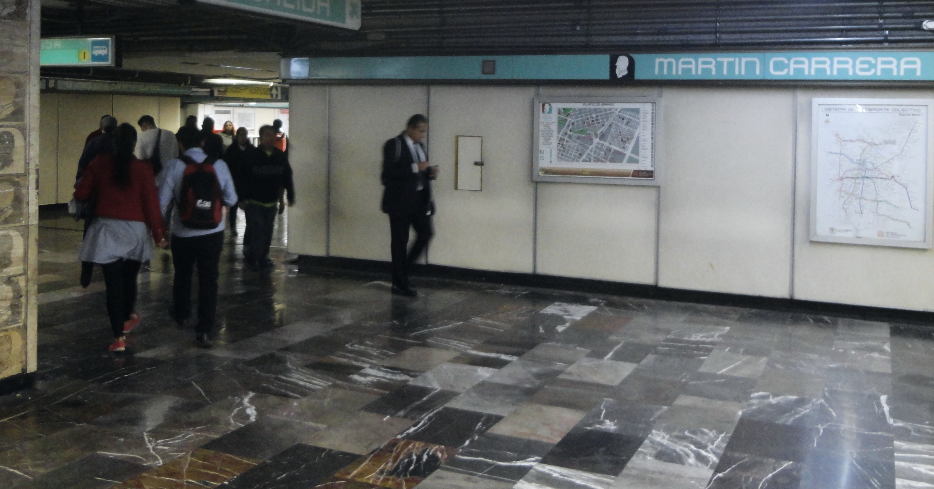 Estación Martín Carrera - Línea 4 - Metro de la Ciudad de México